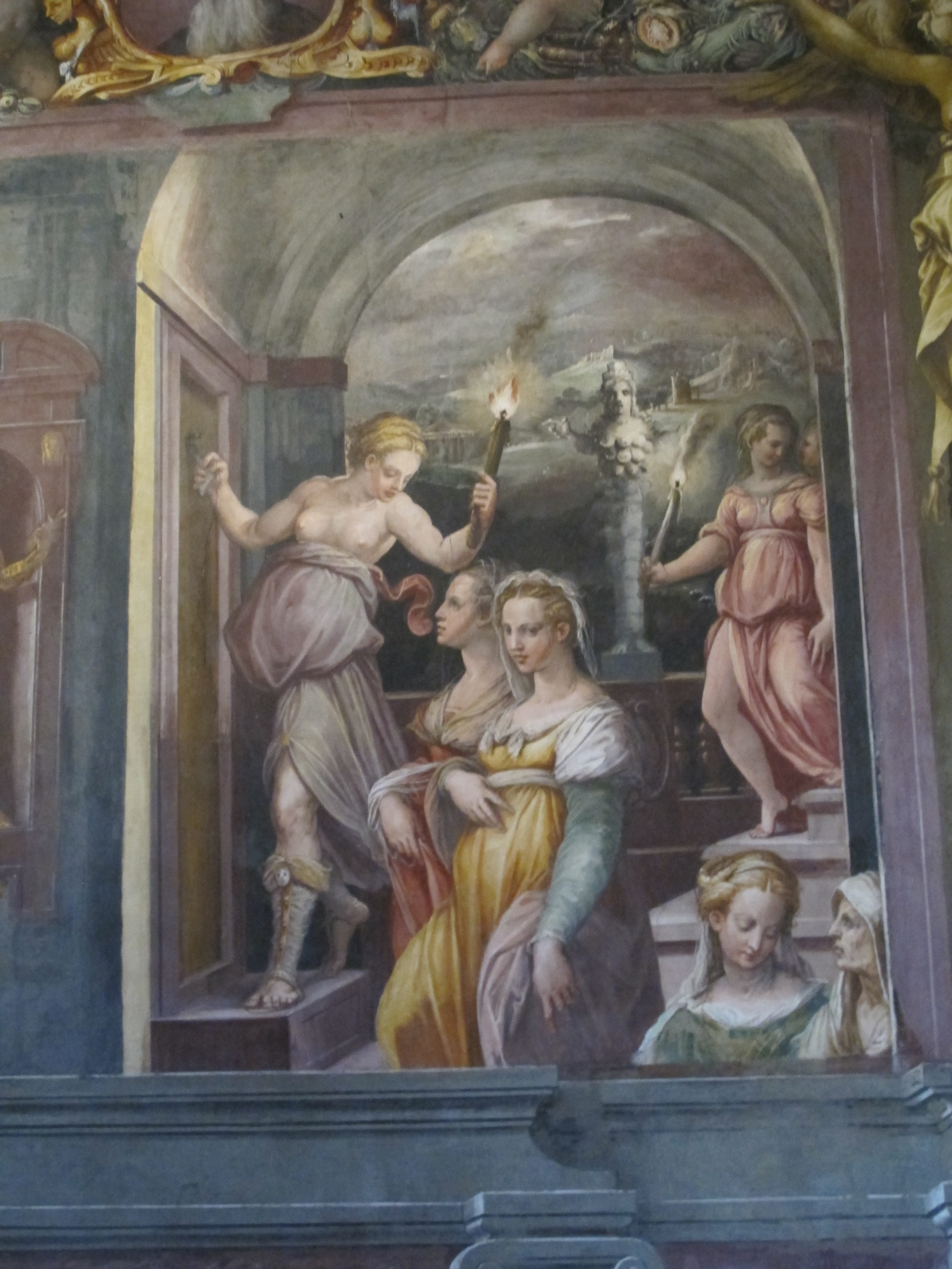 Casa vasari FI, salone, storie di zeusi